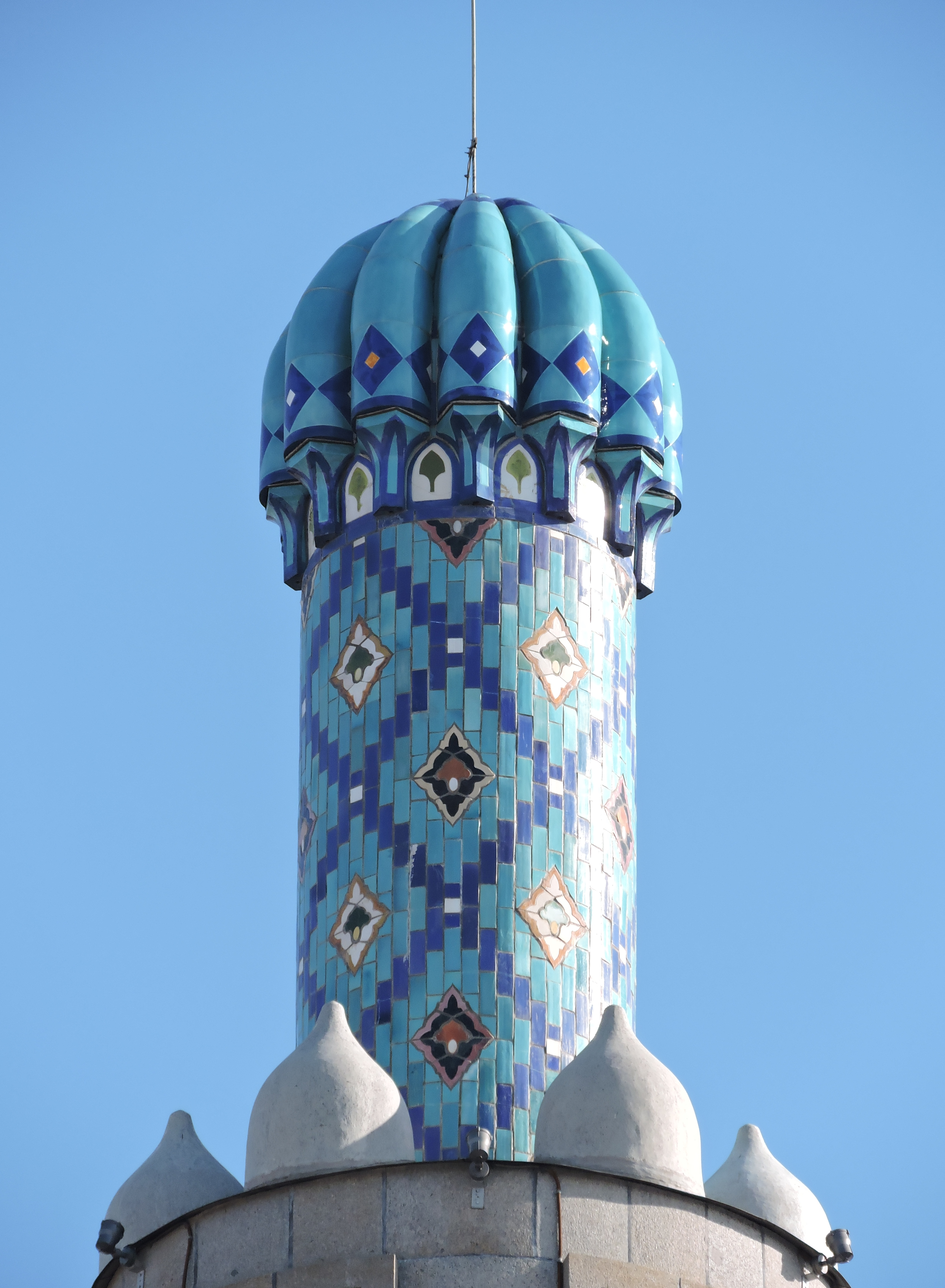 Оба минарета Петербургской соборной мечети увенчаны вот такими башенками